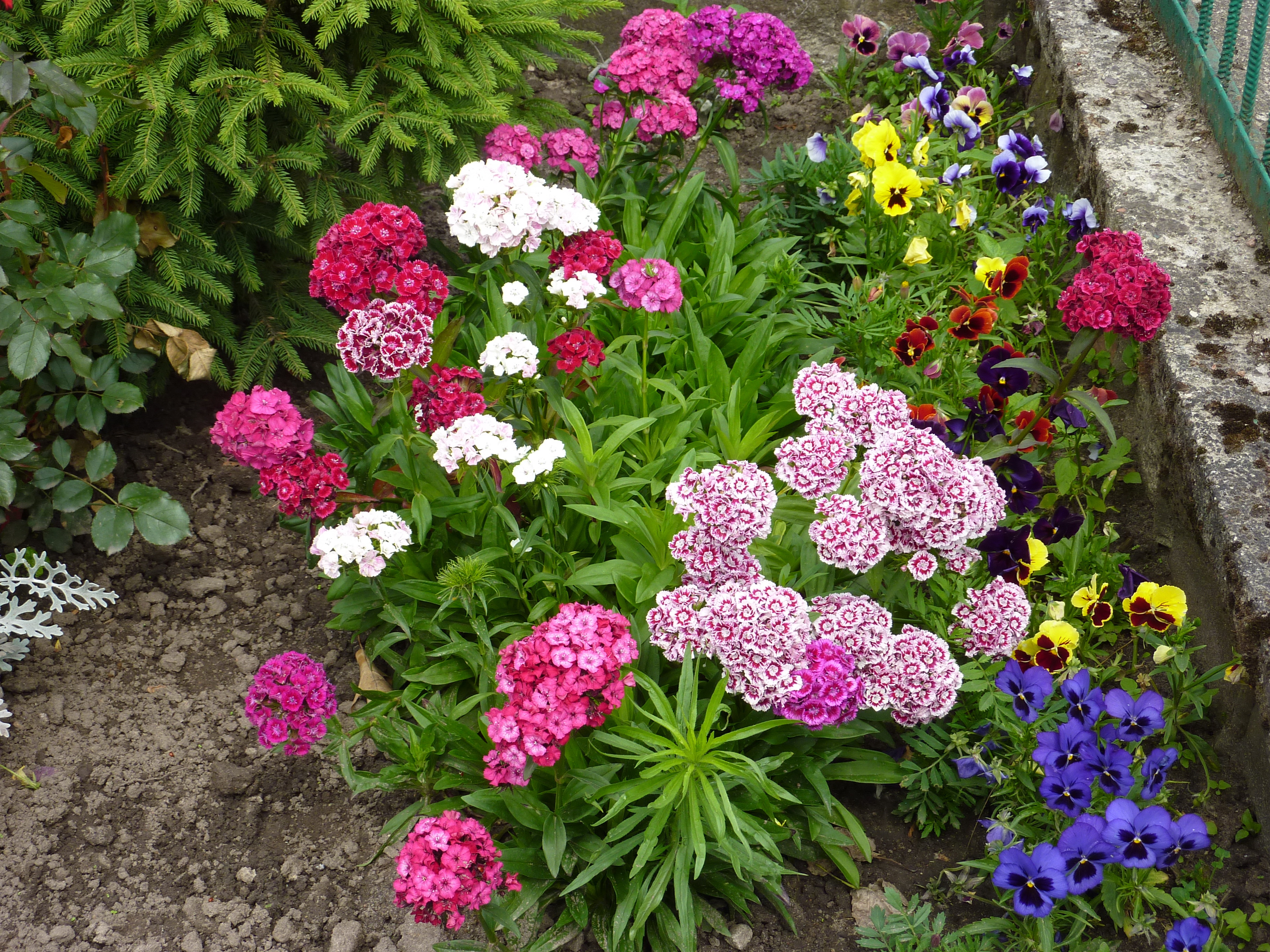 Goździk brodaty Pomerania, Poland